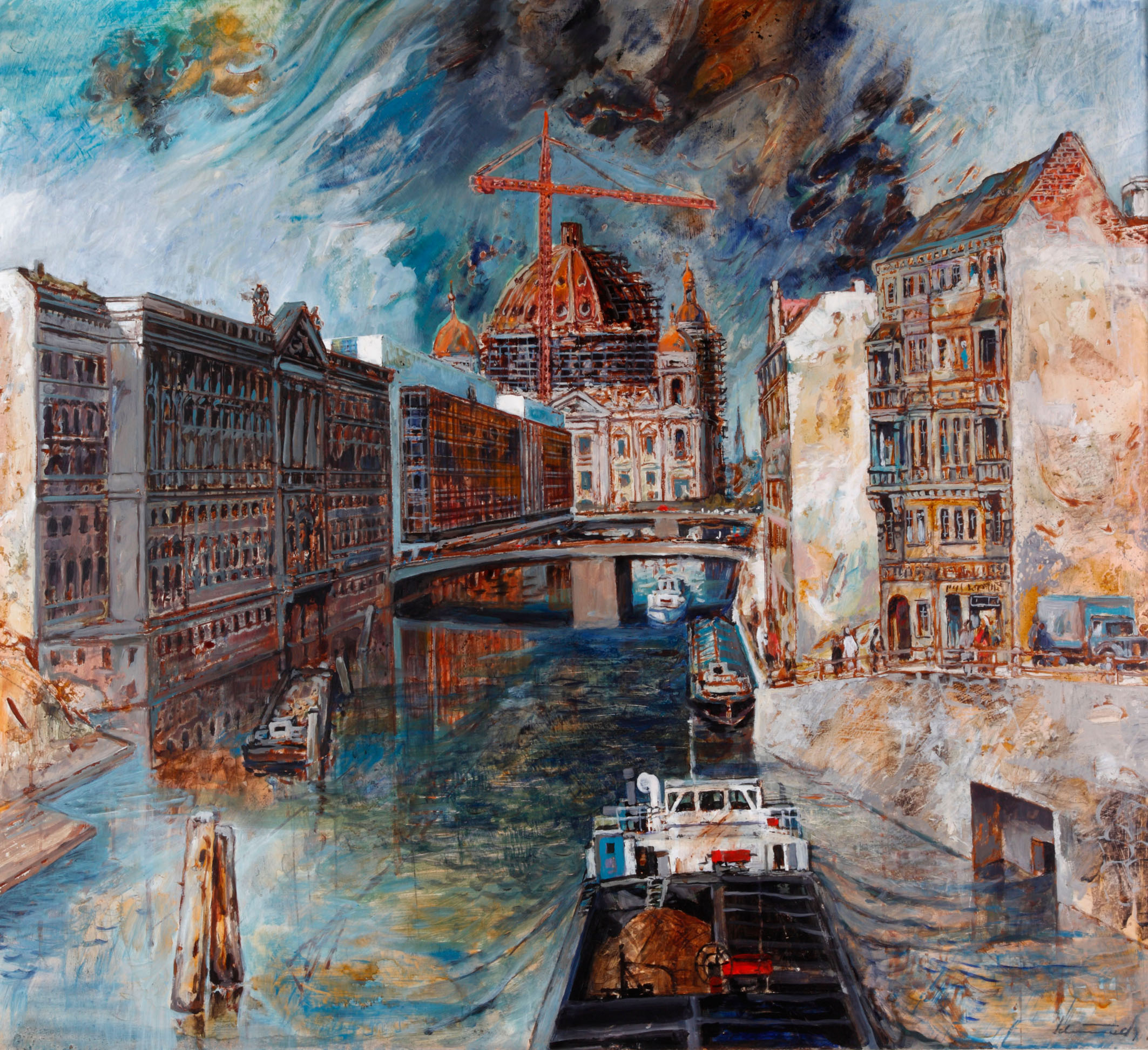 Blick auf Berlin 1976